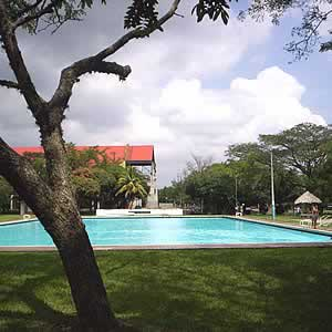 Piscina del Centro Deportivo Universitario (CDU) de la Universidad del Valle. Cali, Colombia.